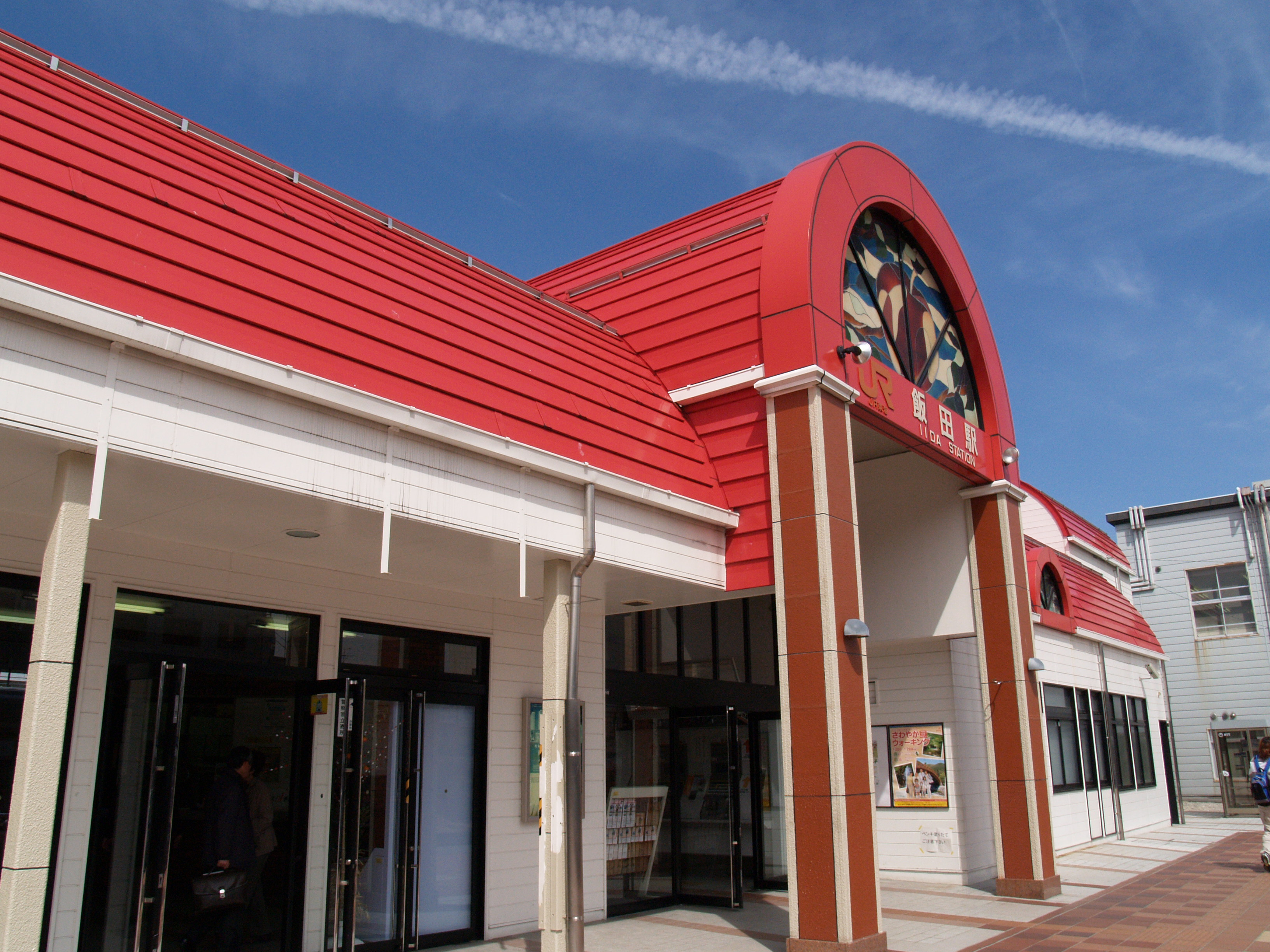 飯田駅駅舎